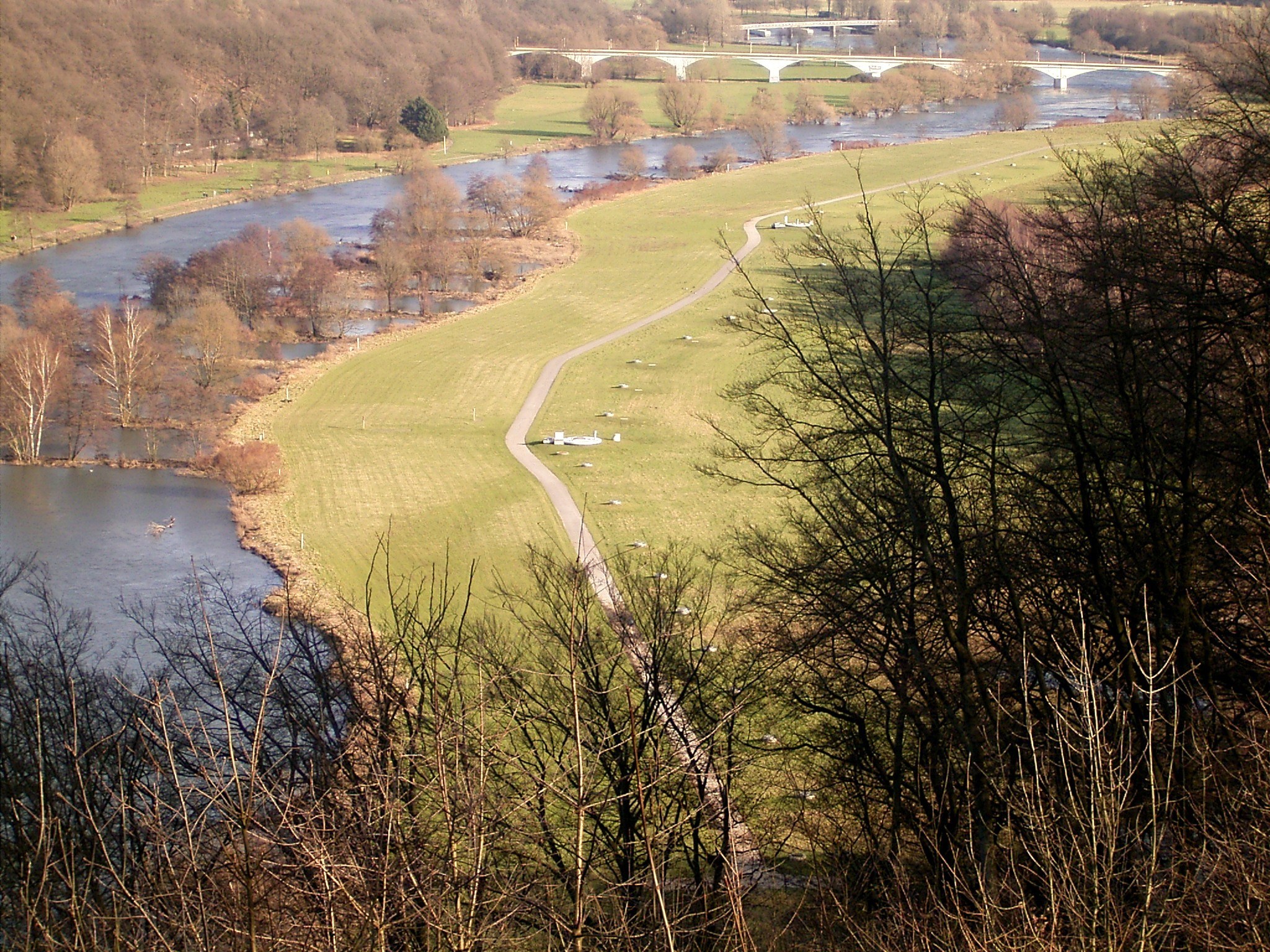 Blick vom Gethmannschen Garten in Hattingen - Blankenstein in östliche Richtung. Das Ufer der Ruhr in Hattingen-Blankenstein mit einer Kette von Brunnen zur Gewinnung von Uferfiltrat. Hintergrund: die Brücke der L551 (Kemnader Straße/An der Kemnade), dahinter die Brücke am Kemnader Wehr.